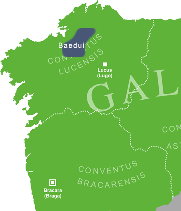 Mapa que amosa situación aproximada da tribo dos Baedui, na provincia romana da Gallaecia